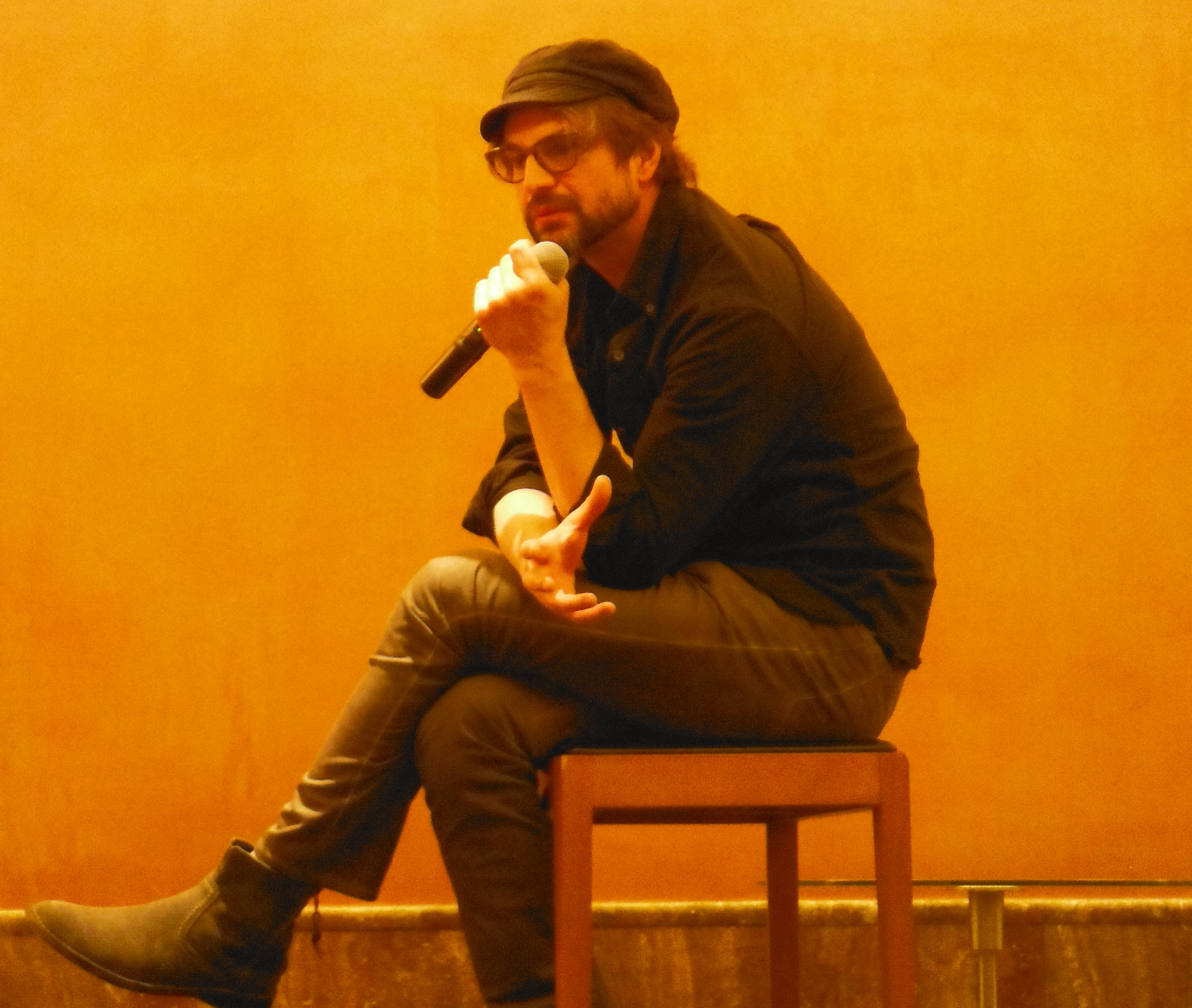 Ο Γκέιλ Χάρολντ στη "Queens of the Road" Convention που έγινε στο Μπιλμπάο το 2014.